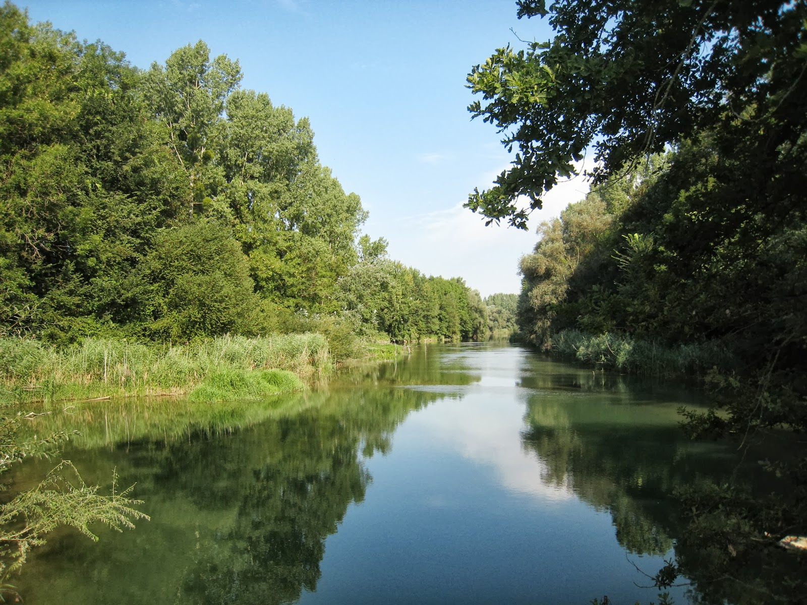 Vrijdag 23 augustus 2013. Near Weisweil, Germany